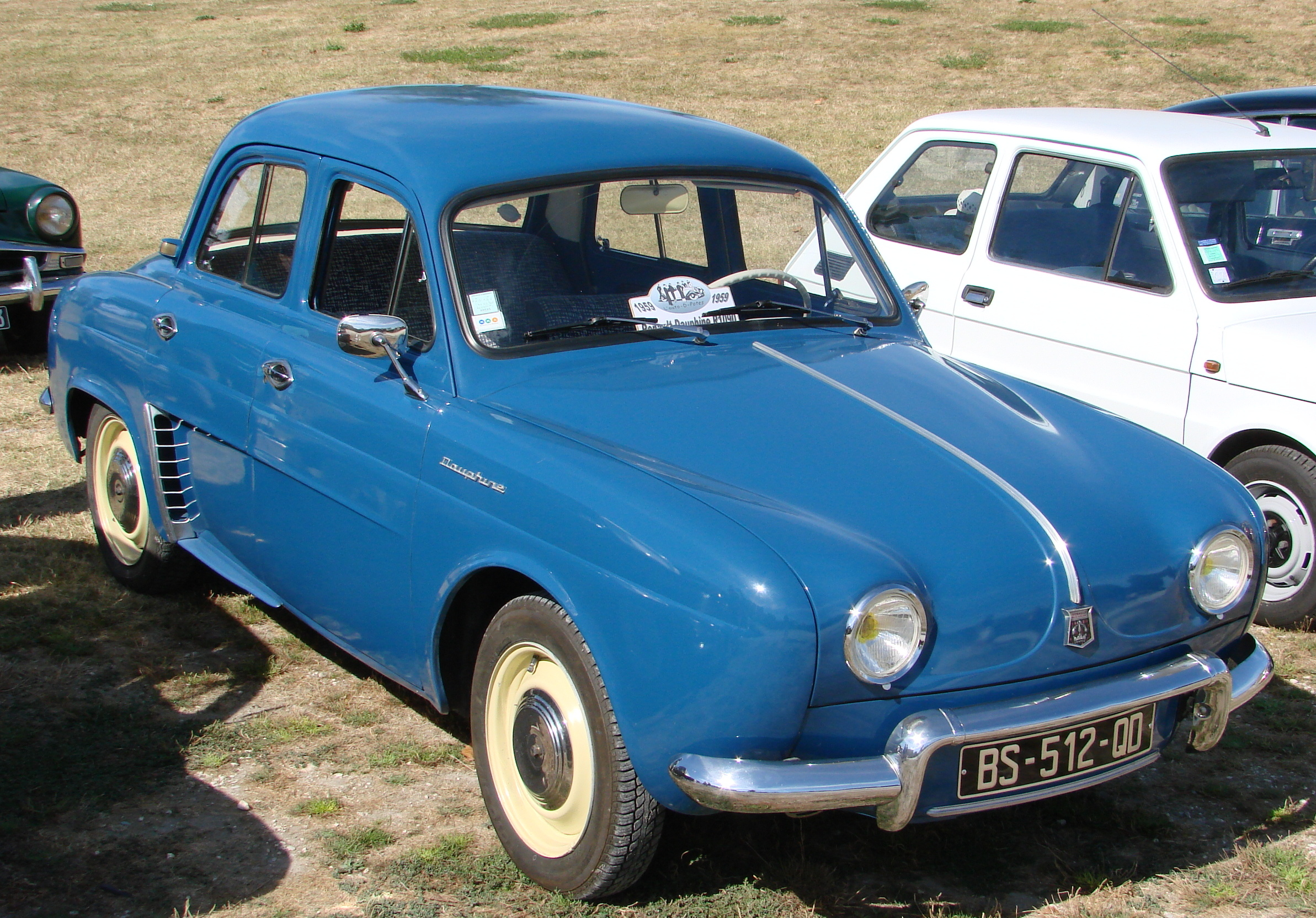 Renault Dauphine en 2012 aux journées du patrimoine de Blaye